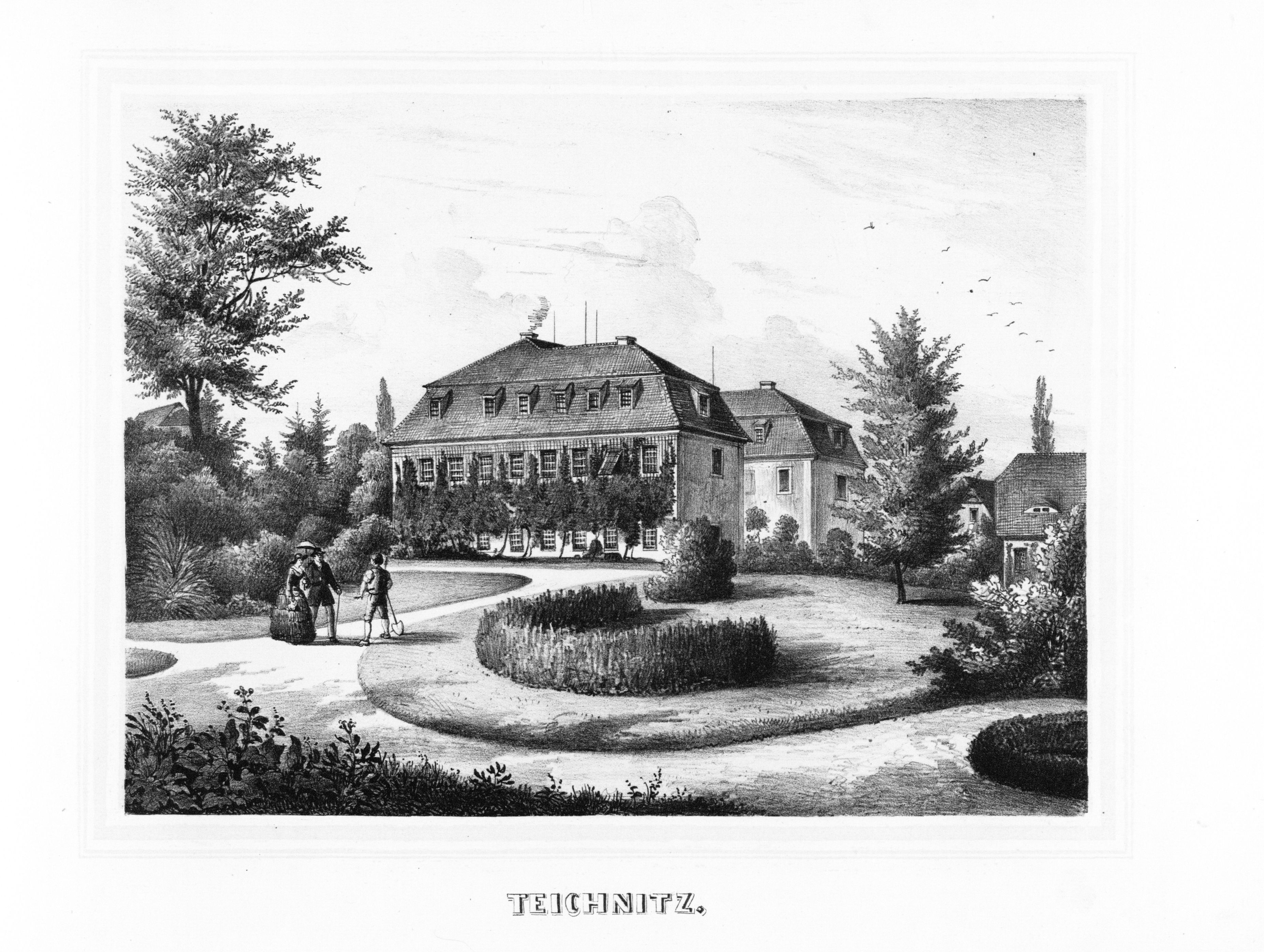 Teichnitz aus: Album der Rittergüter und Schlösser im Königreiche Sachsen Markgrafenthum Oberlausitz Section: III